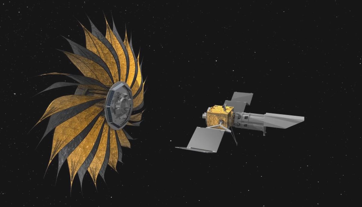 Starshade Artist's Concept 2 How do we find Earth-like planets outside our solar system? One idea is to send a giant structure that blocks starlight so that astronomers can more easily detect orbiting planets. This artist's rendering shows the proposed starshade concept flying in sync with a space telescope. The giant sunflower-like structure would be used to acquire images of Earth-like rocky planets around nearby stars. The proposed starshade could launch together with a telescope. Once in space, it would separate from the rocket and telescope, unfurl its petals, then move into position to block the light of stars.